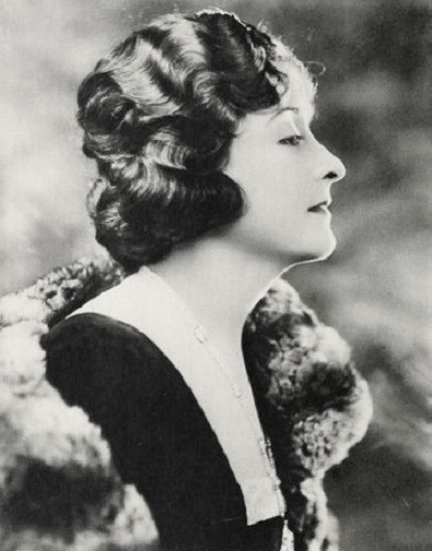 Clara Kimball Young